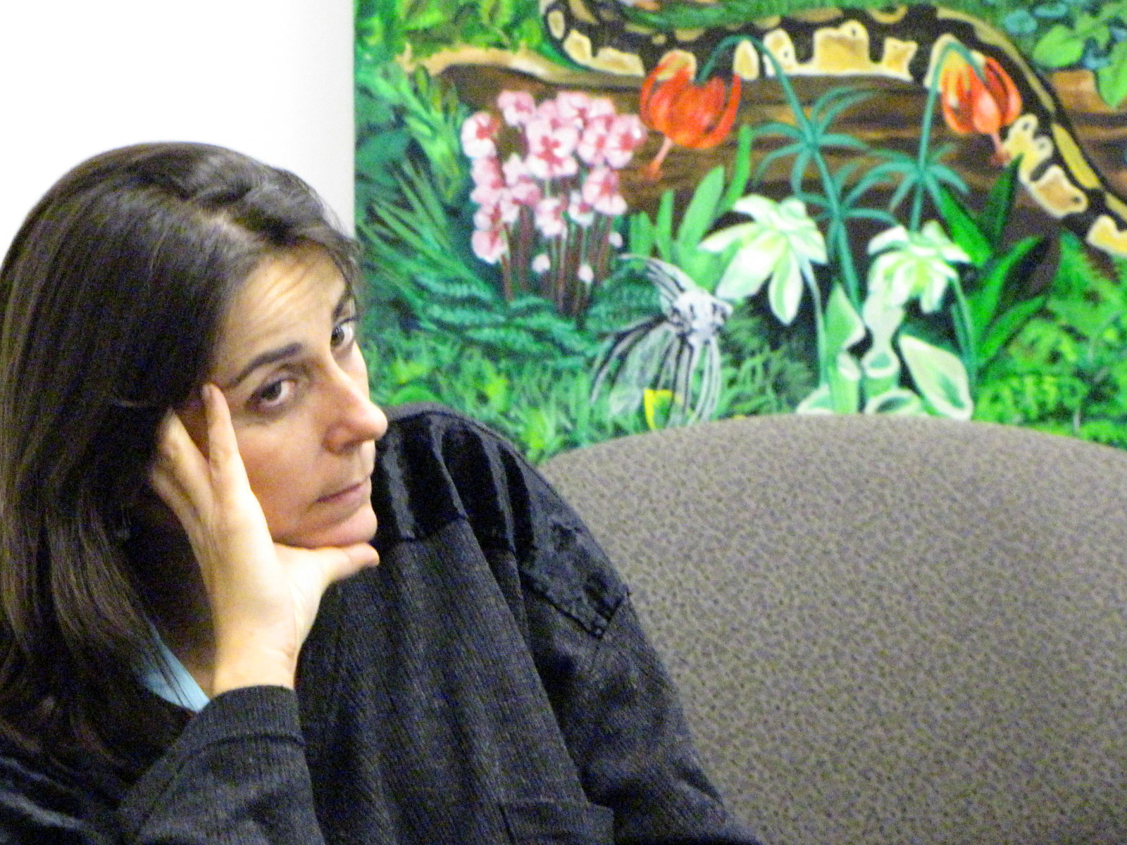 Botánica brasileña Digital Compositae Data Workshop, Encyclopedia of Life Biodiversity Synthesis Center, Field Museum, Chicago, 15-17 April 2010